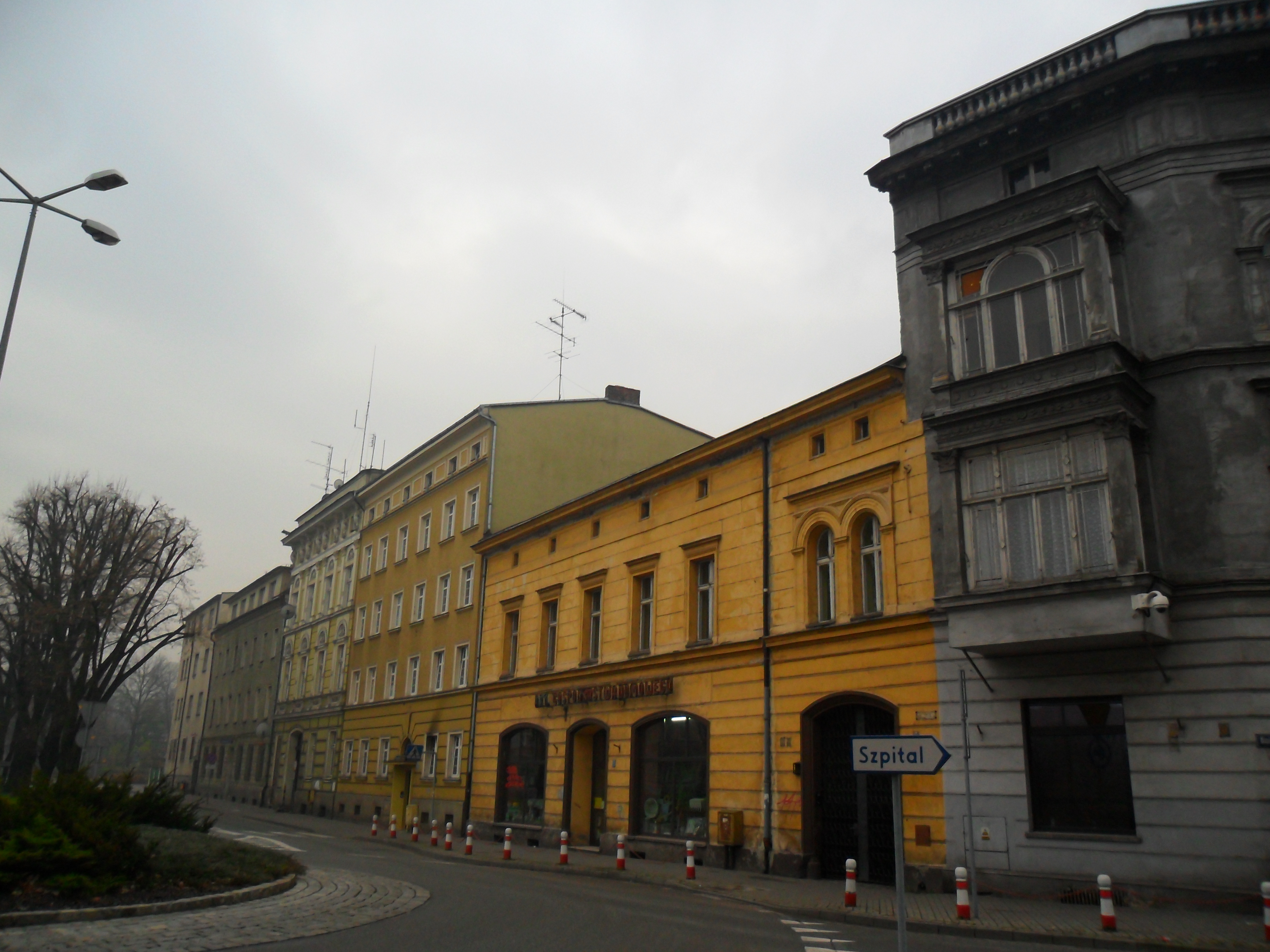 Kamienice na placu Wolności w Raciborzu